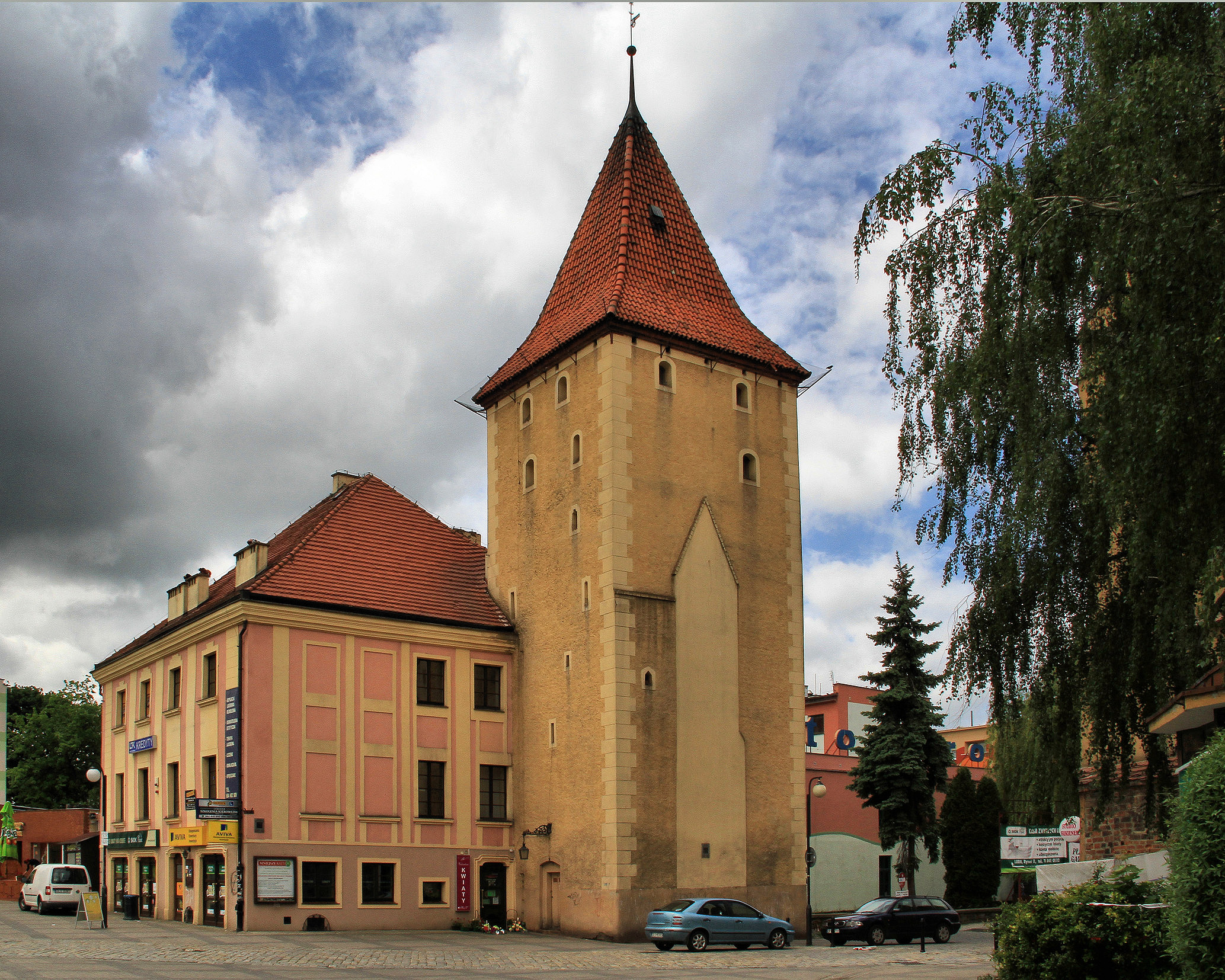 Lubin, ul. Tysiąclecia (zabytek nr A/3029/352)